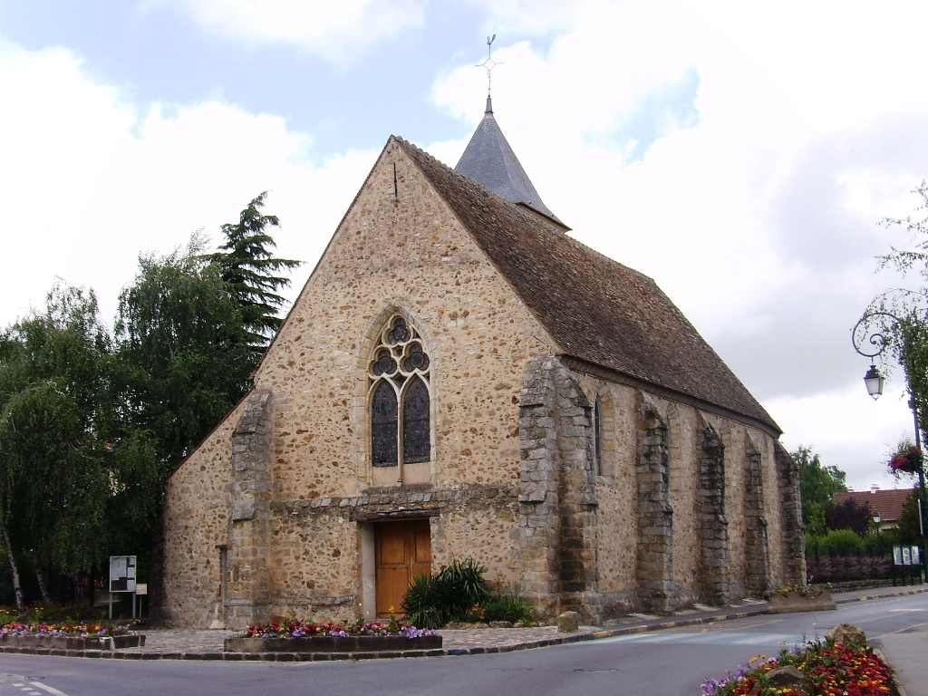 Eglise Saint-Jacques et Saint-Philippe de Ballainvilliers (91)